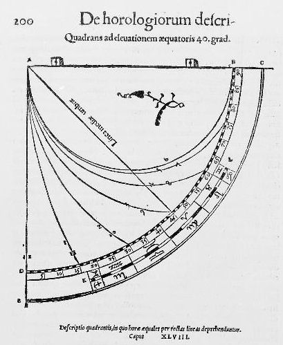 Quadrant ancien à heures inégales pour une colatitude de 40° correspondant à une latitude de 50°.